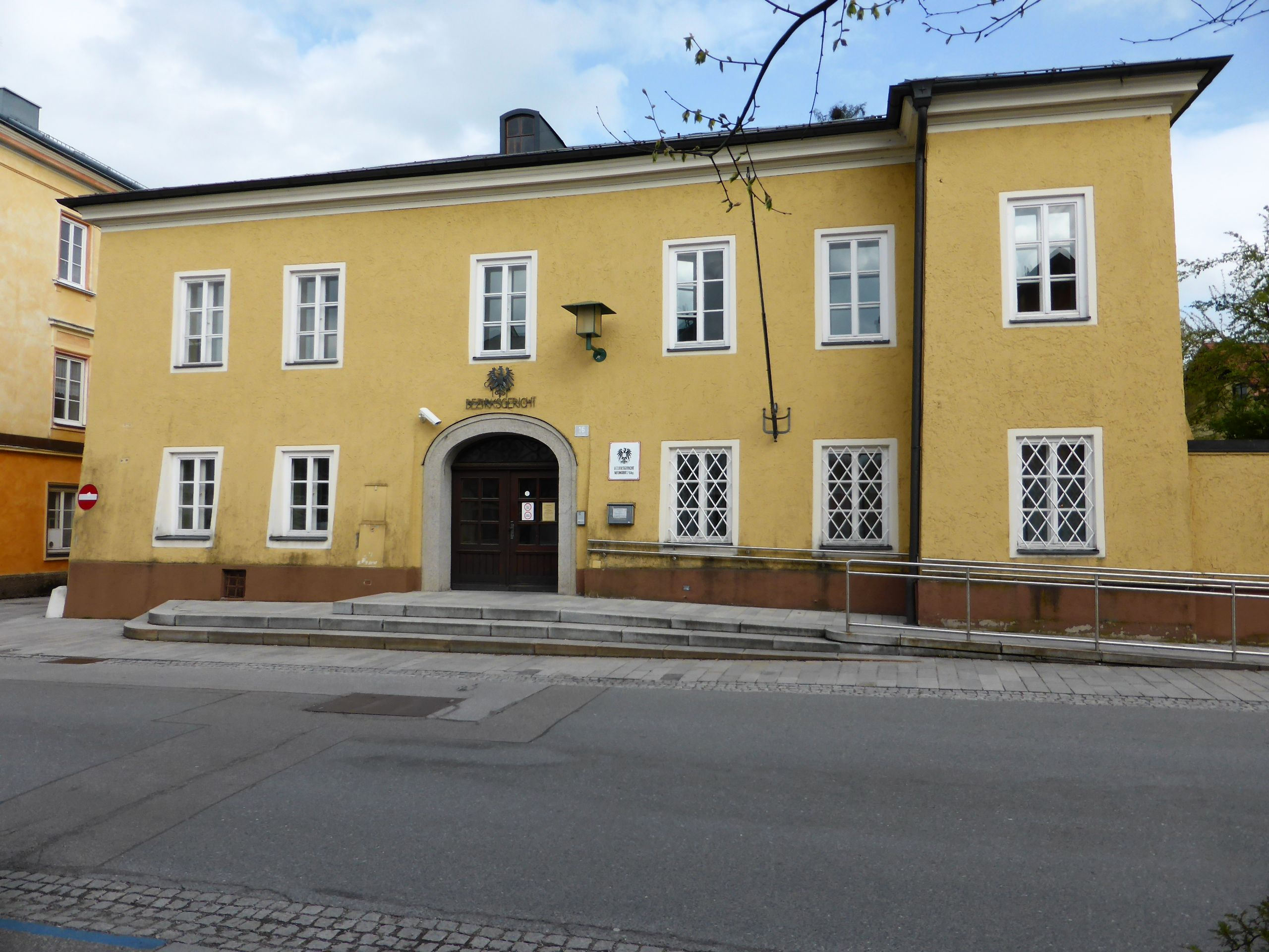 Bezirksgericht mit Gerichtskapelle